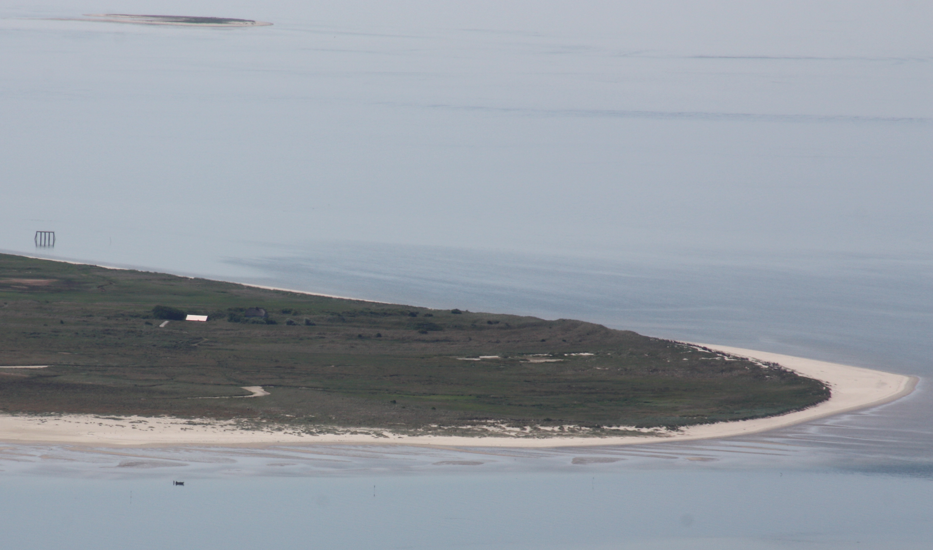 Blick ungefähr von Norden auf den nordwestlichen Bereich von Memmert sowie auf Lütje Hörn (im Hintergrund, oben links im Bild); Foto aufgenommen beim Flug über Juist; Flughöhe 500 m = 1500 ft; Juli 2010. – Zu erkennen sind am linken Bildrand Fundamentreste eines ehemals auf Memmert und seit den 1970ern in der See stehenden Gebäudes sowie die beiden heutigen Gebäude auf Memmert (Reetdachhaus von 1971 und Vogelwärterhaus).